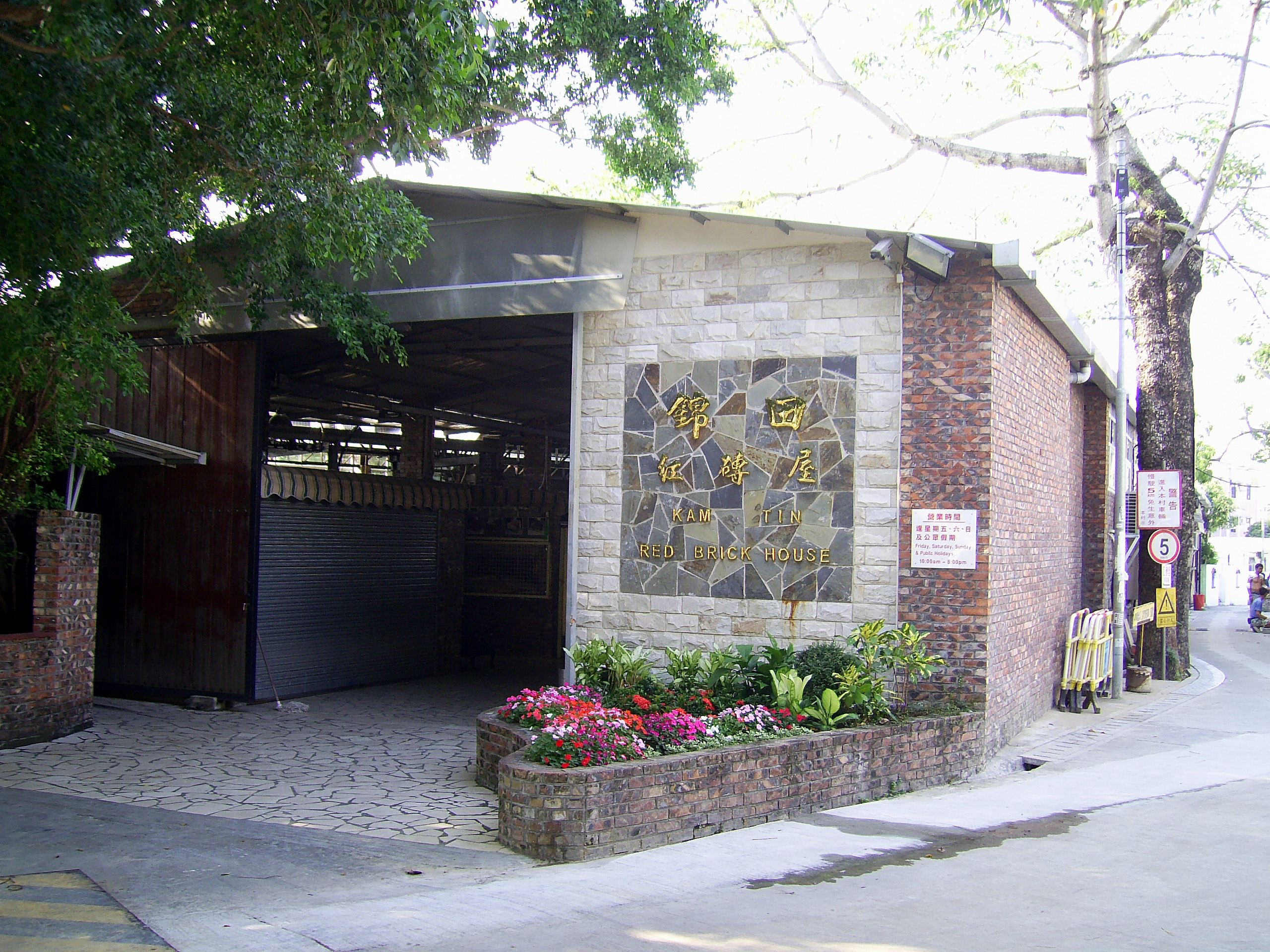 中文（香港）: 錦田紅磚屋